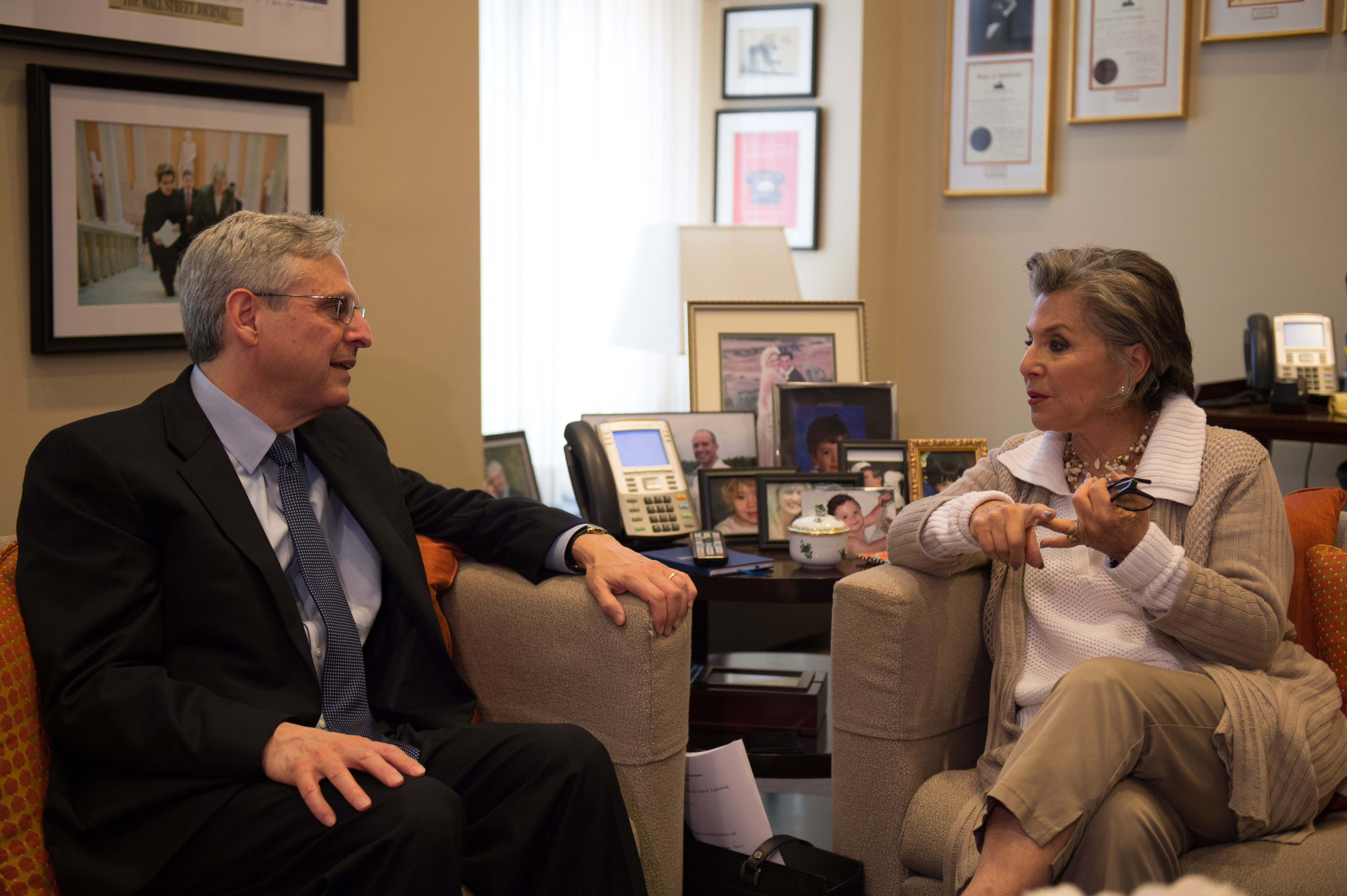 Senator Boxer meets Judge Garland